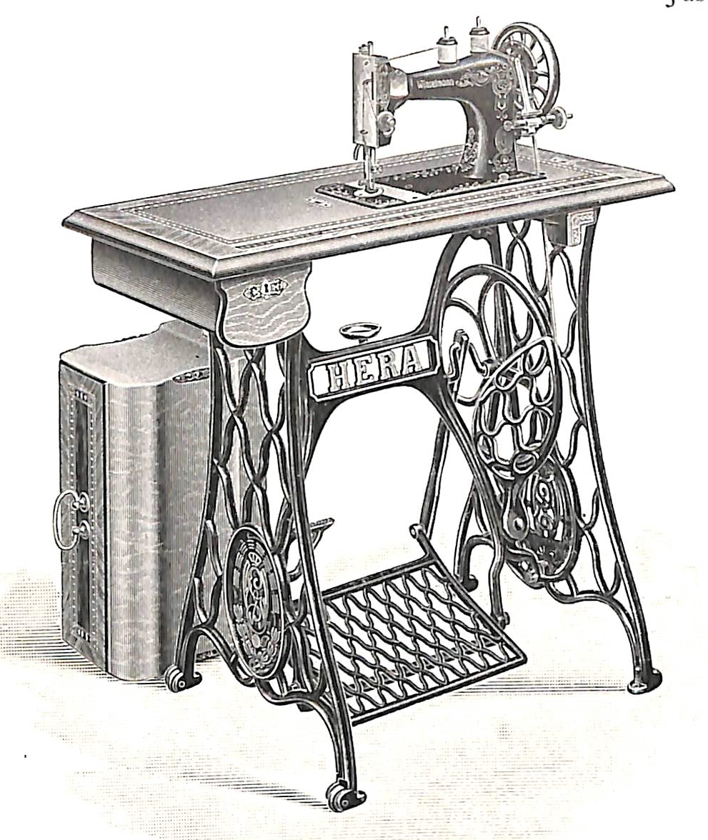 Altenburg - Das Model HERA der Nähmaschinenfabrik G. Winselmann in Altenburg.